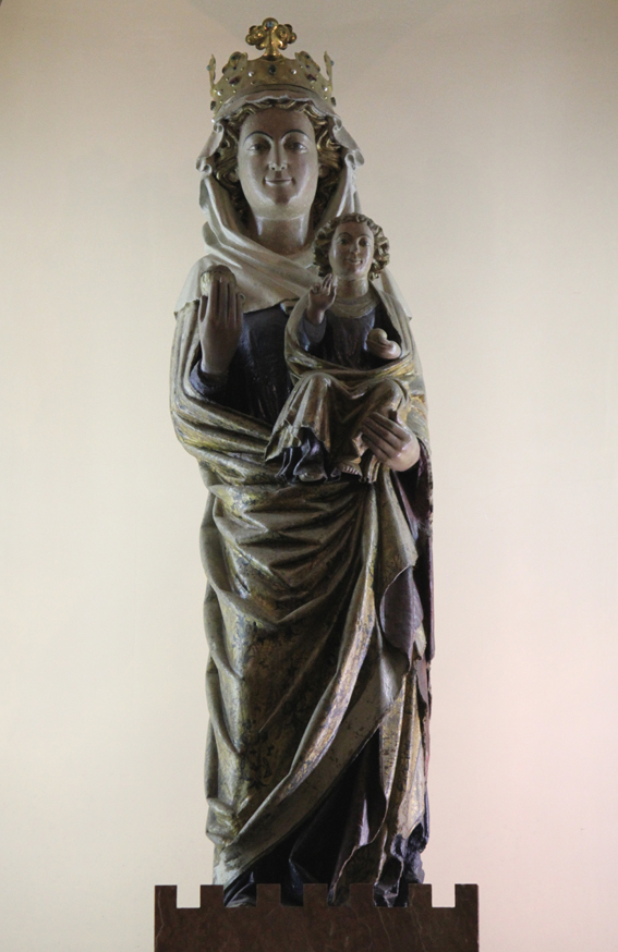 Virgen del Castillo Viejo, imagen de piedra policromada de estilo gótico (siglo XIII) a tamaño real, patrona de Valencia de Don Juan.